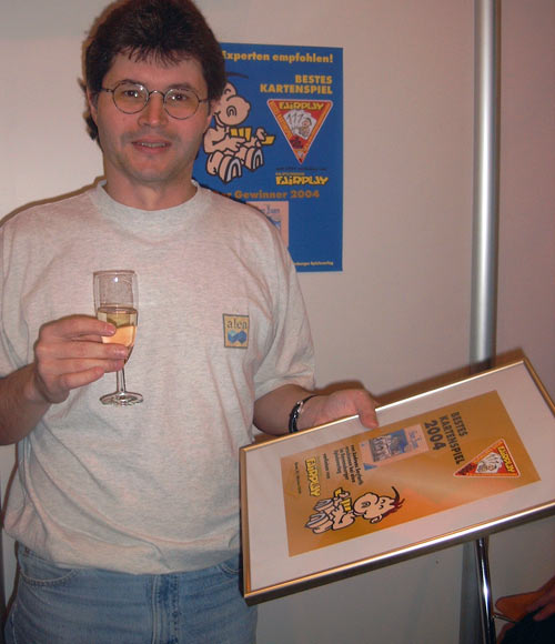 Stefan Brück in Essen